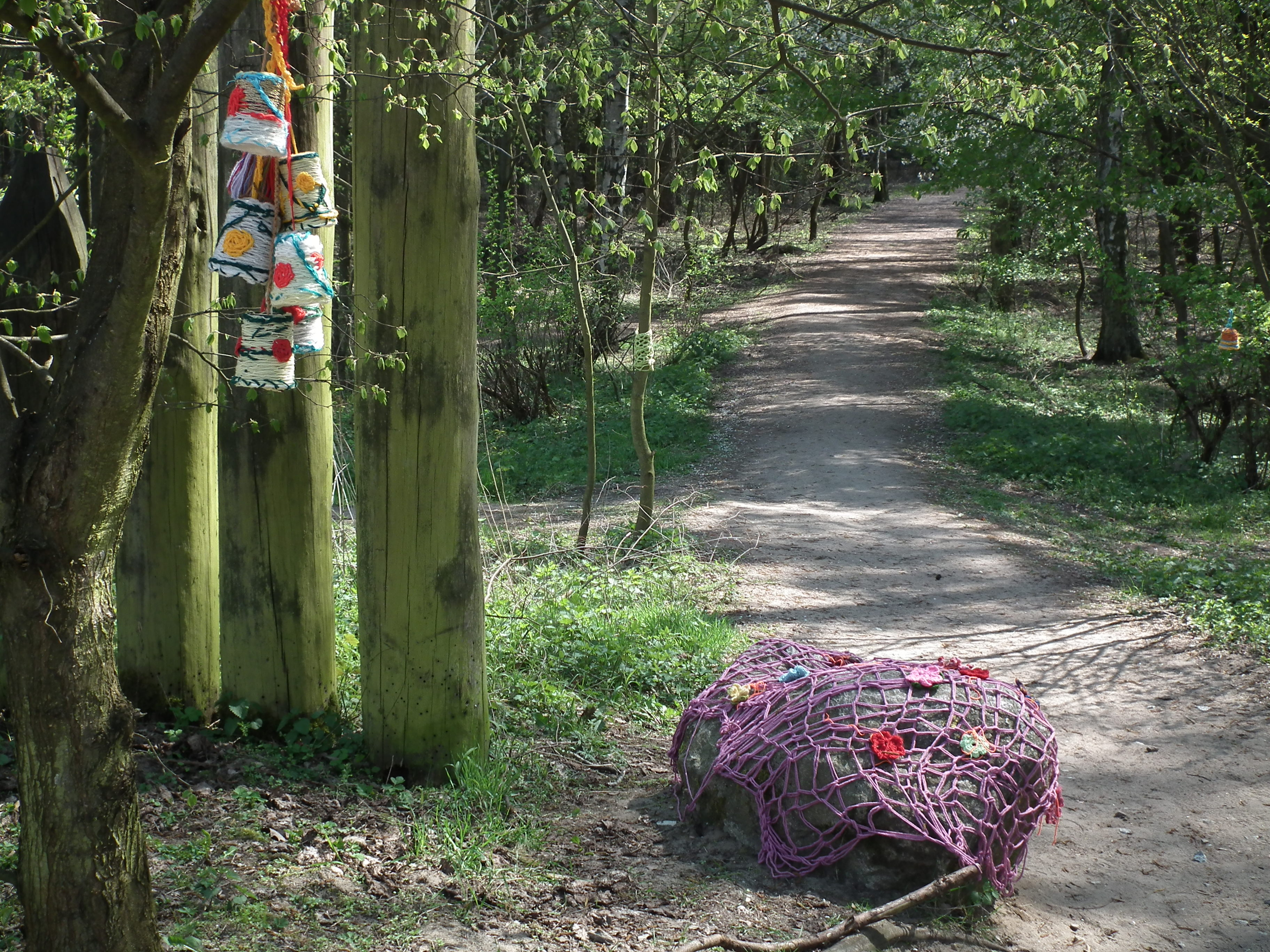 Działania artystyczne pod Dziewiczą Górą.